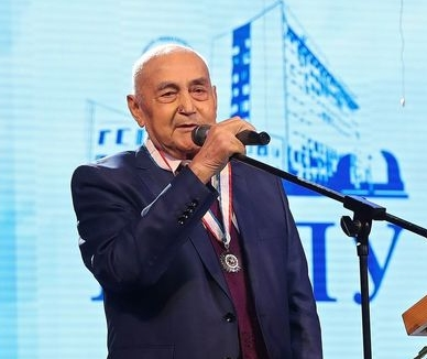 Якубов, Февзи Якубович